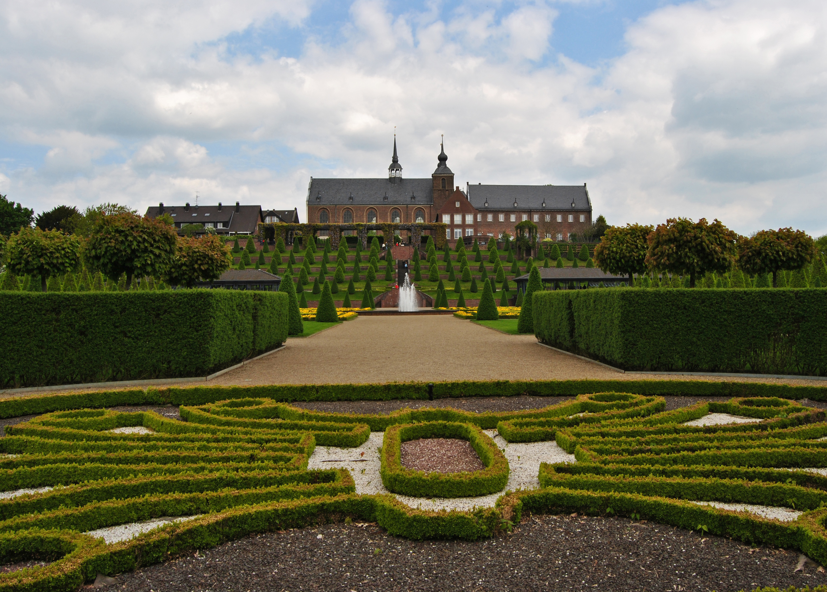 Das in Kamp-Lintfort liegende Kloster Kamp mit dem davor liegenden Klostergarten. Das Bild wurde vom südlichen Ende dieses Gartens aus gemacht.